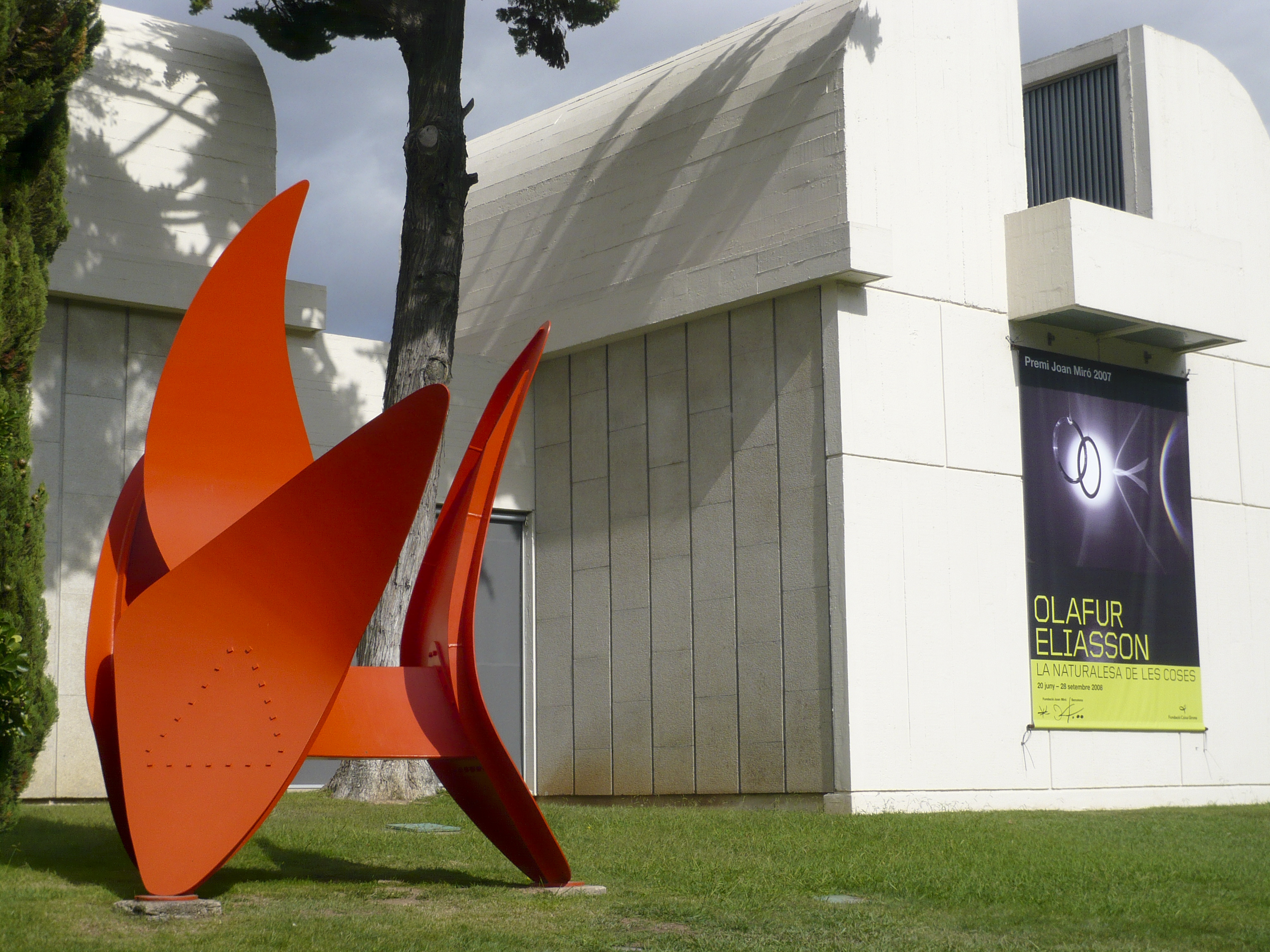 Fundació Joan Miró